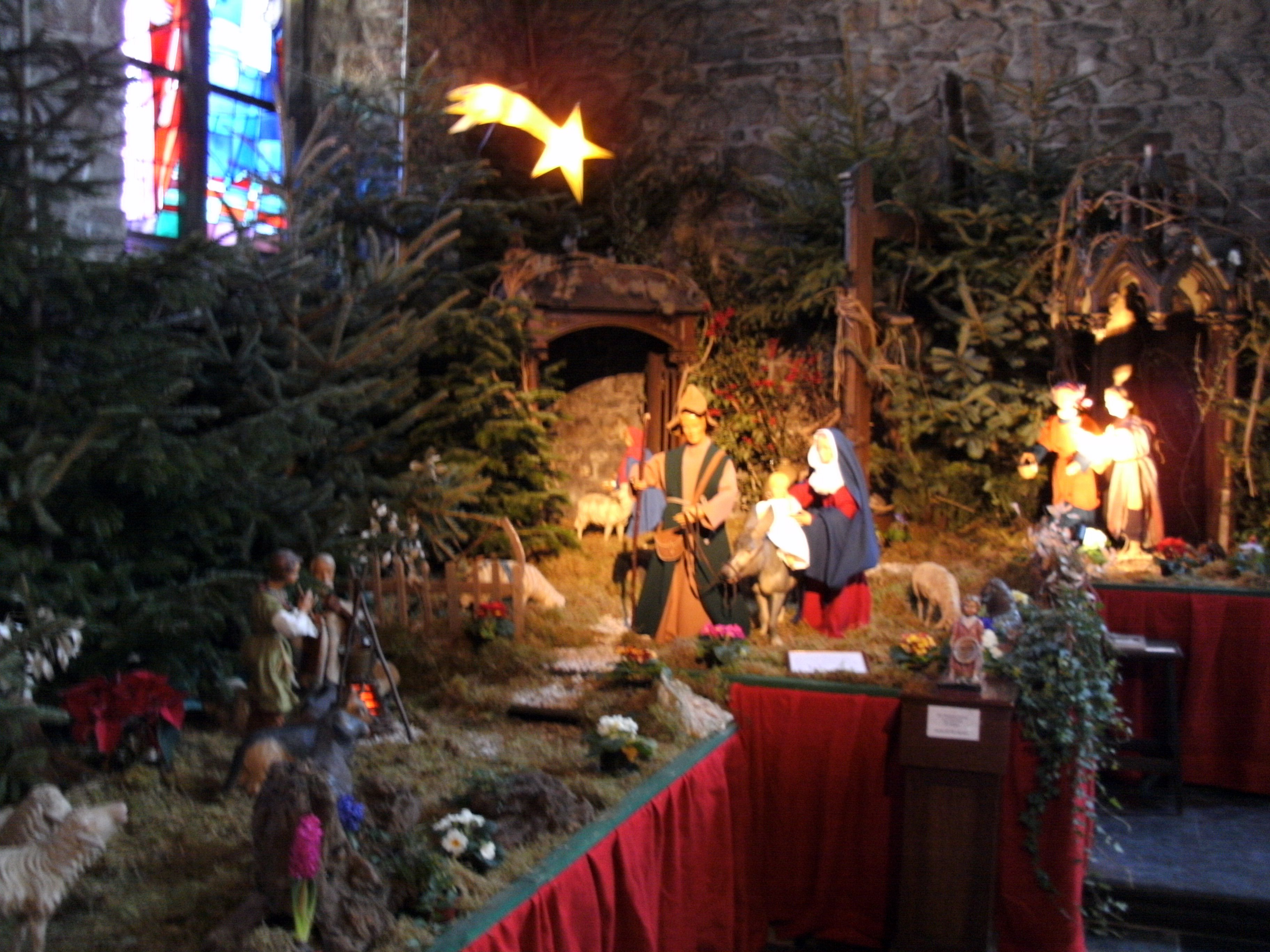 Krippe in St. Hubertus, Büsbach